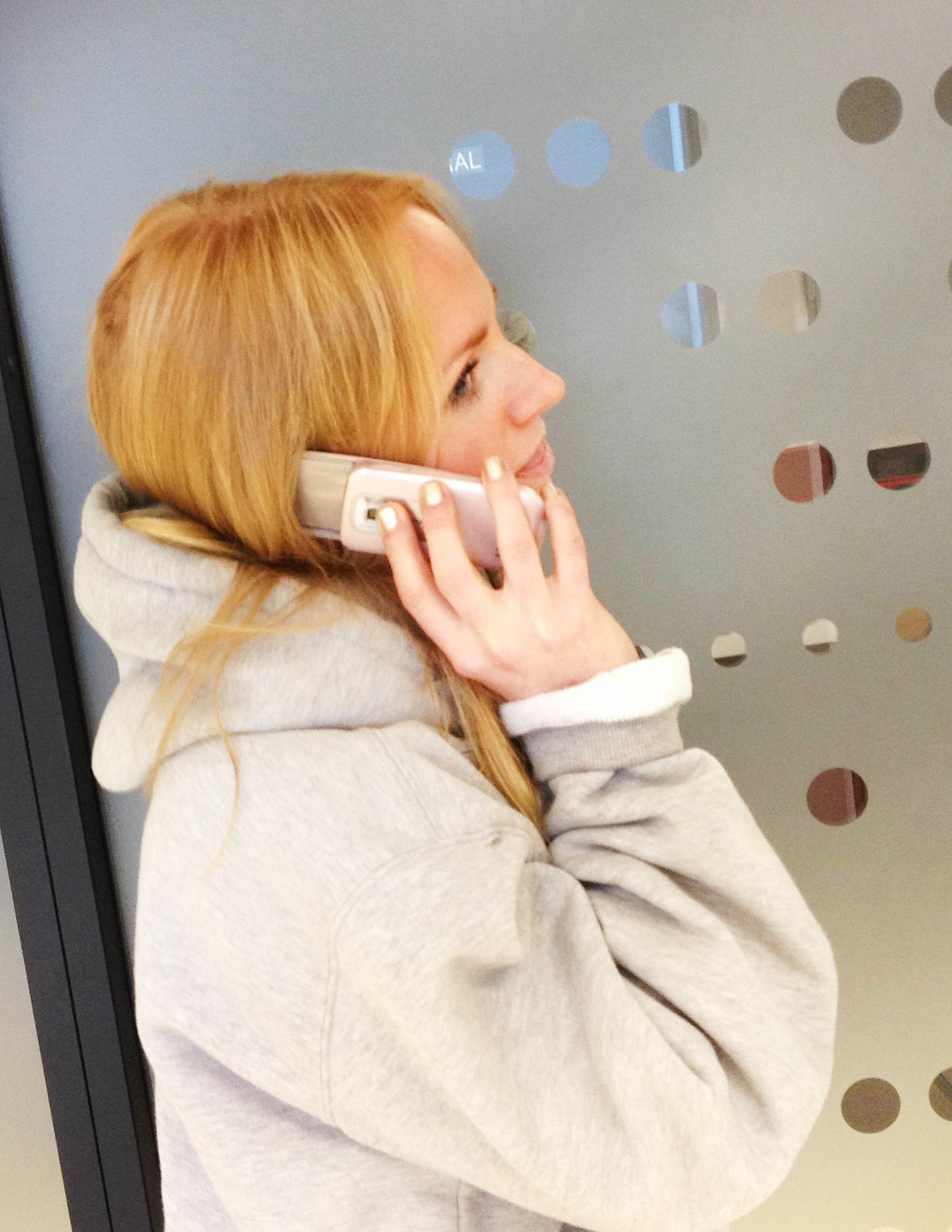 Man eksponeres for radiobølger når man bruker mobiltelefon. Det pågår en debatt hvorvidt eksponeringen utgjør helserisiko.